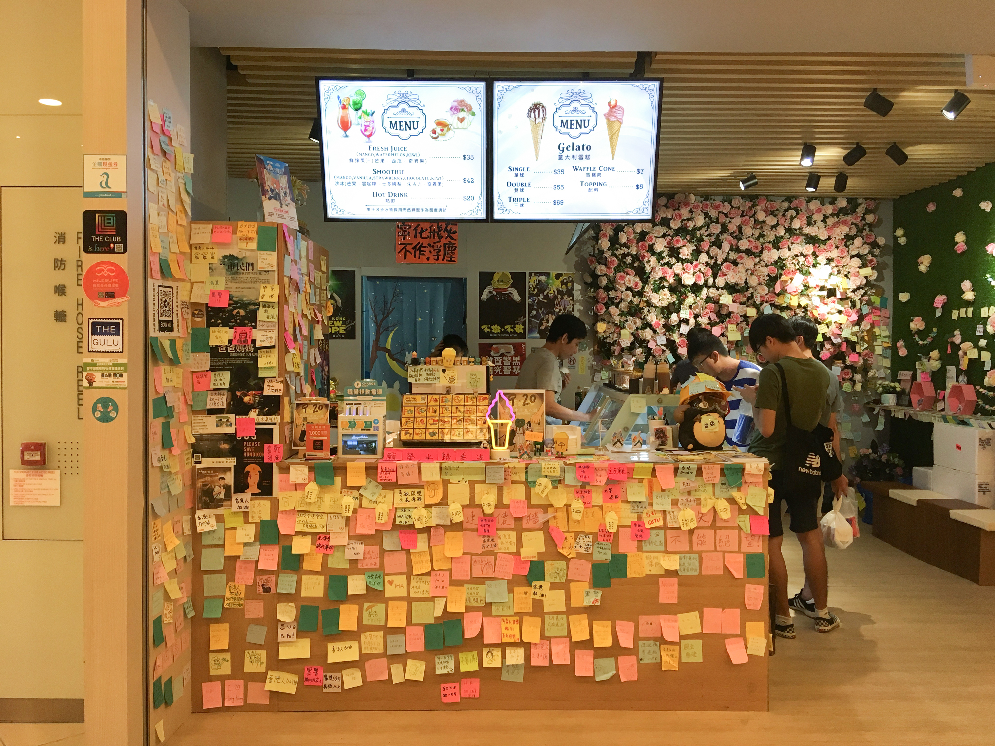 Citywalk 2 Sogno Gelato